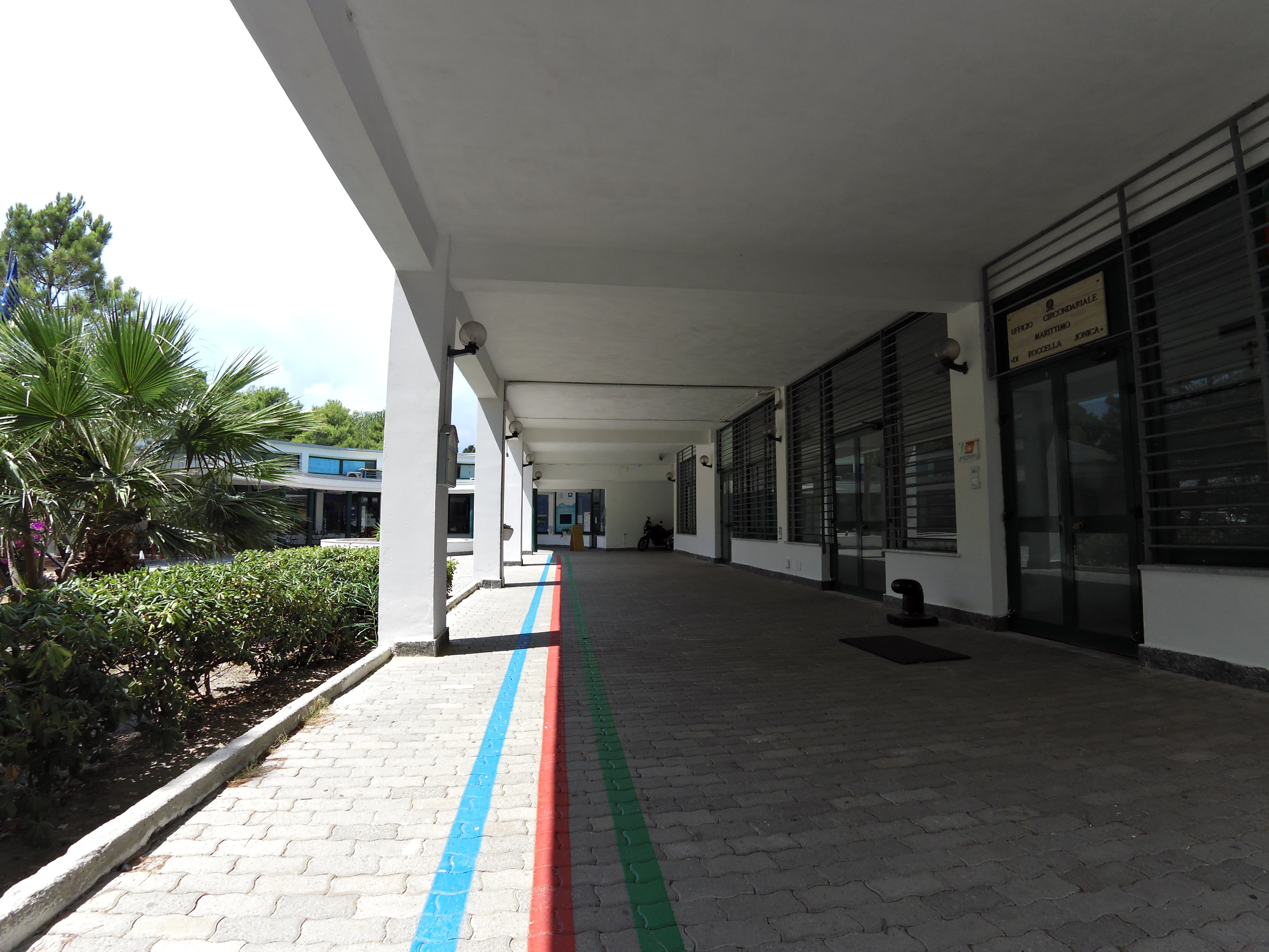 Ufficio circondiaeriale martittimo - Porto di Roccella (2018)